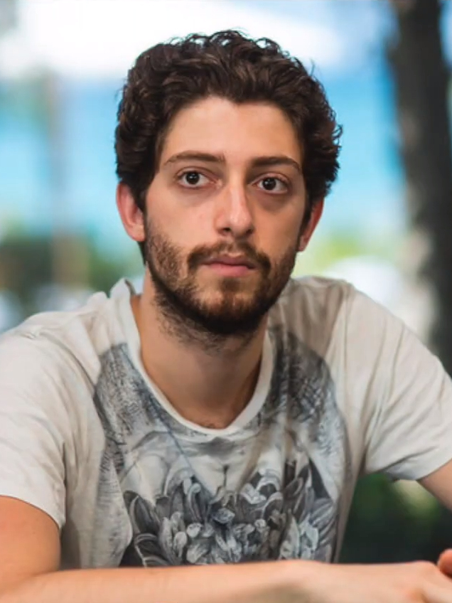 Igor Kurganow beim WPT Alpha 8 St. Kitts